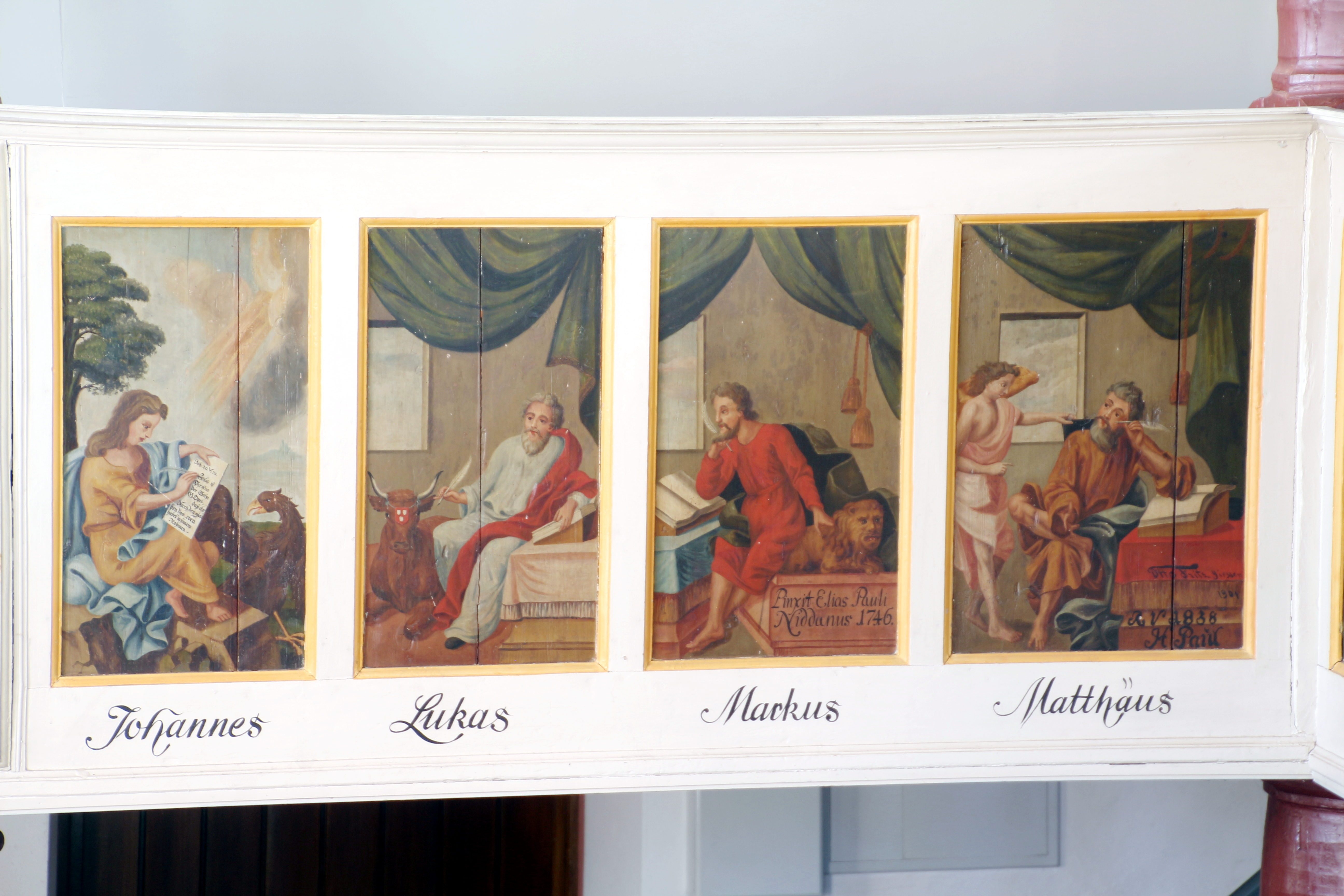 Evangelische Kirche Wallernhausen, Gemeinde Nidda, Wetteraukreis, Hessen